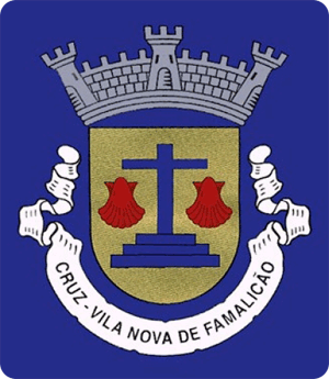 Brasão da Freguesia de Santiago da Cruz em Vila Nova de Famalicão. Pormenor fidedigno da heráldica brasonada.